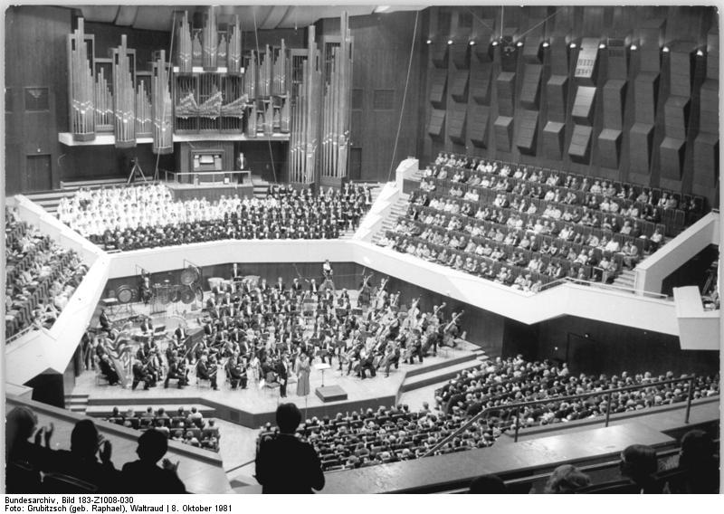 Leipzig, "Neues Gewandhaus", Konzert ADN-ZB Grubitzsch 8.10.81-zi-Leipzig-Gewandhaus-Das erste Konzert des Gewandhausorchesters unter Leitung von Kurz Masur im neuen Gebäude galt am 7.10.81 den am Bau des Hauses Beteiligten.